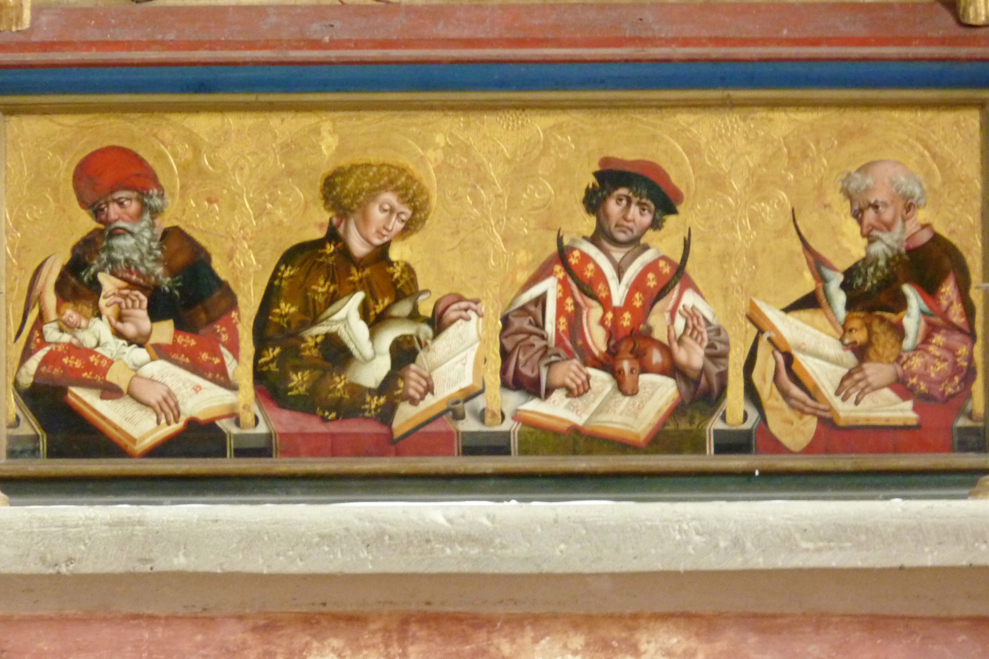 Schlosskapelle Hl. Dreifaltigkeit des Schlosses Blutenburg in Obermenzing im Stadtbezirk Pasing-Obermenzing in München (Bayern/Deutschland), Predella des Hauptaltars aus dem 15. Jahrhundert; Darstellung: Vier Evangelisten mit ihren Symbolen